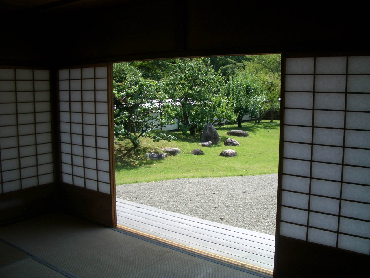 表御殿の庭